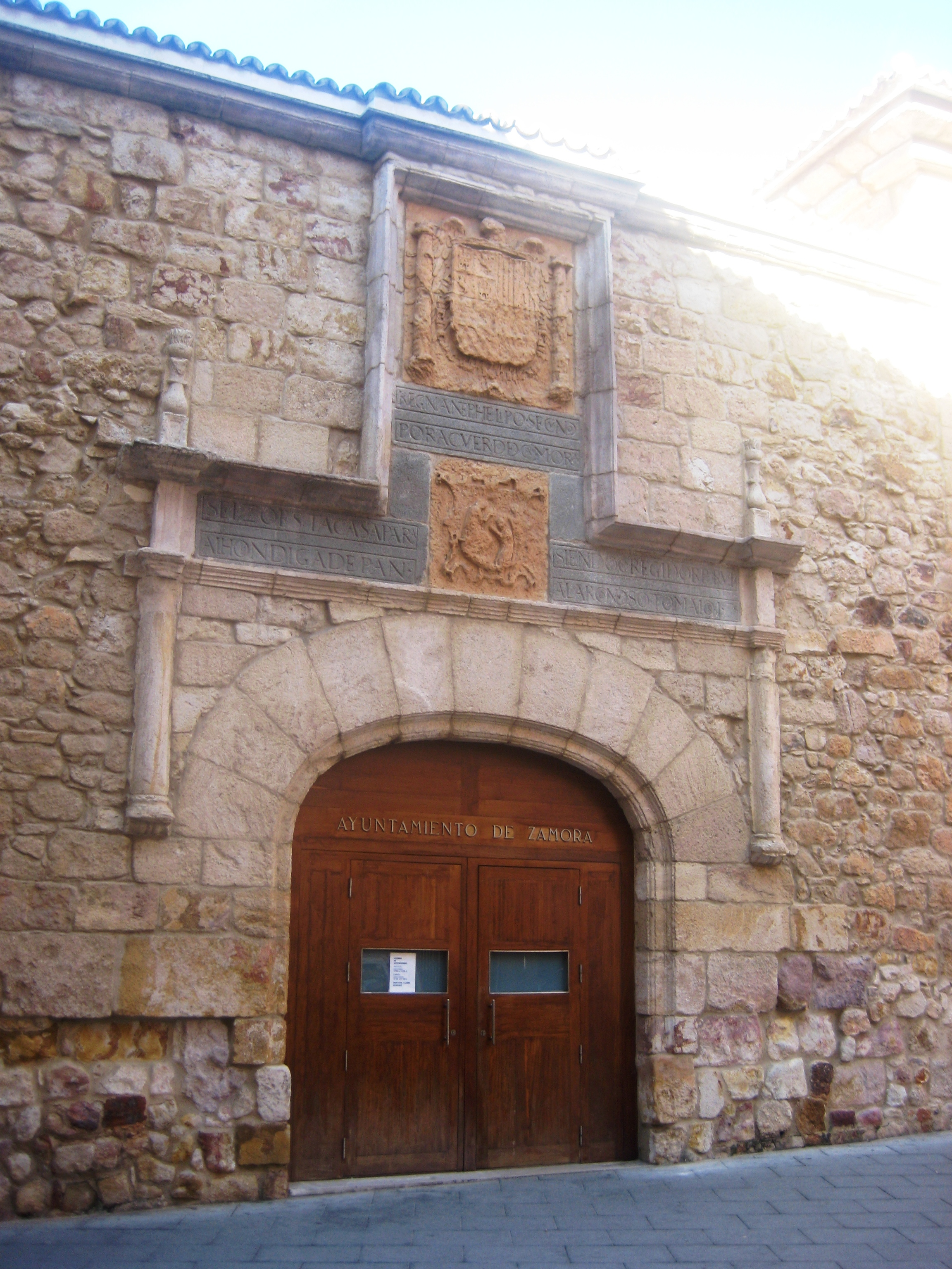 Alhóndiga del Pan (Zamora) (Fachada Sur)